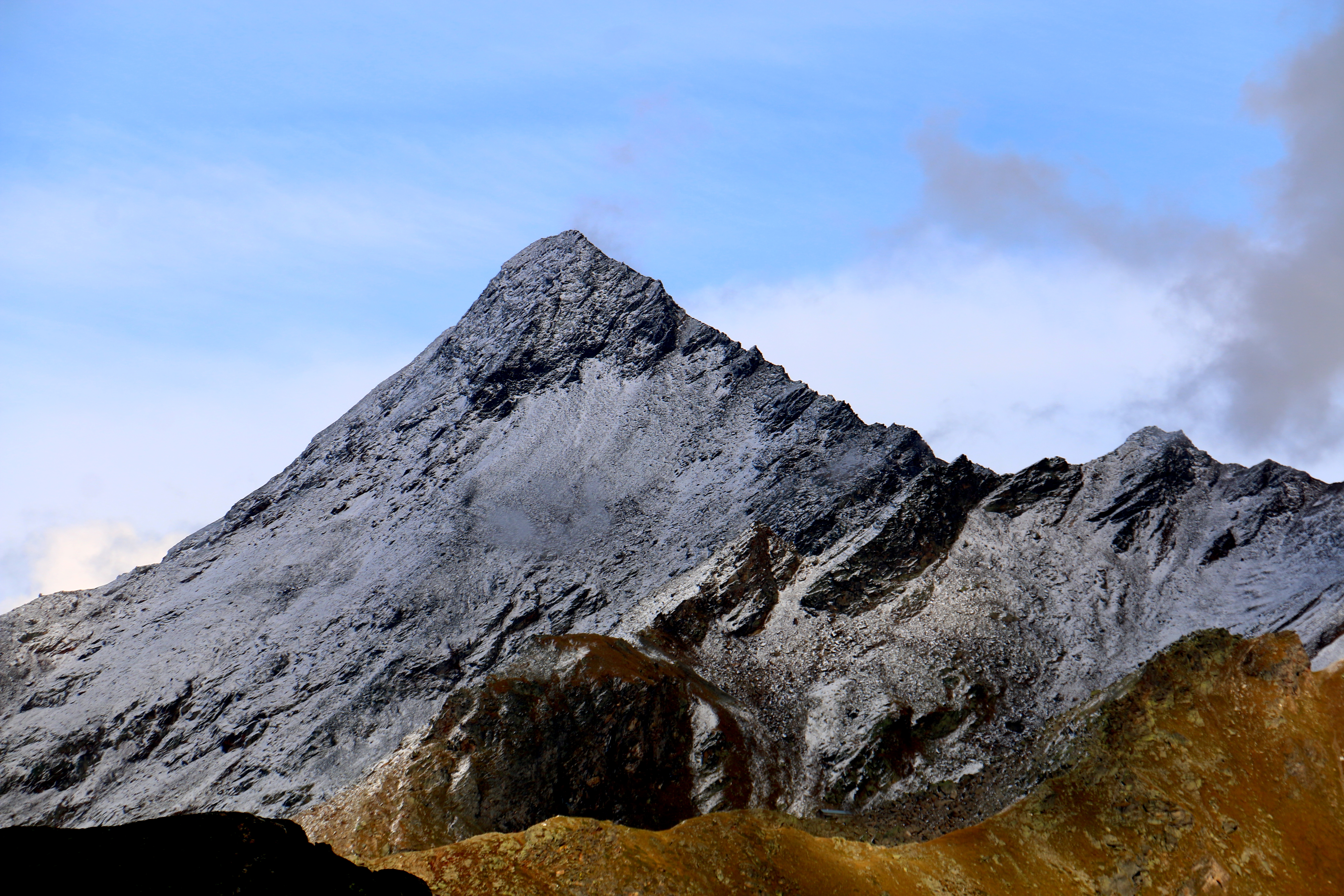 Wasenhorn